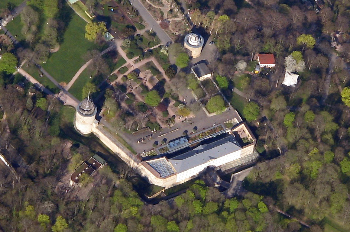 Luftbild von der Zitadelle Cyriaksburg aus Richtung Osten